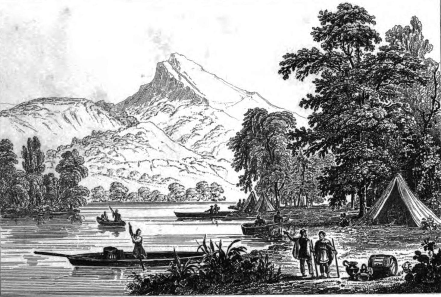 Mingrelien. Der Phasis